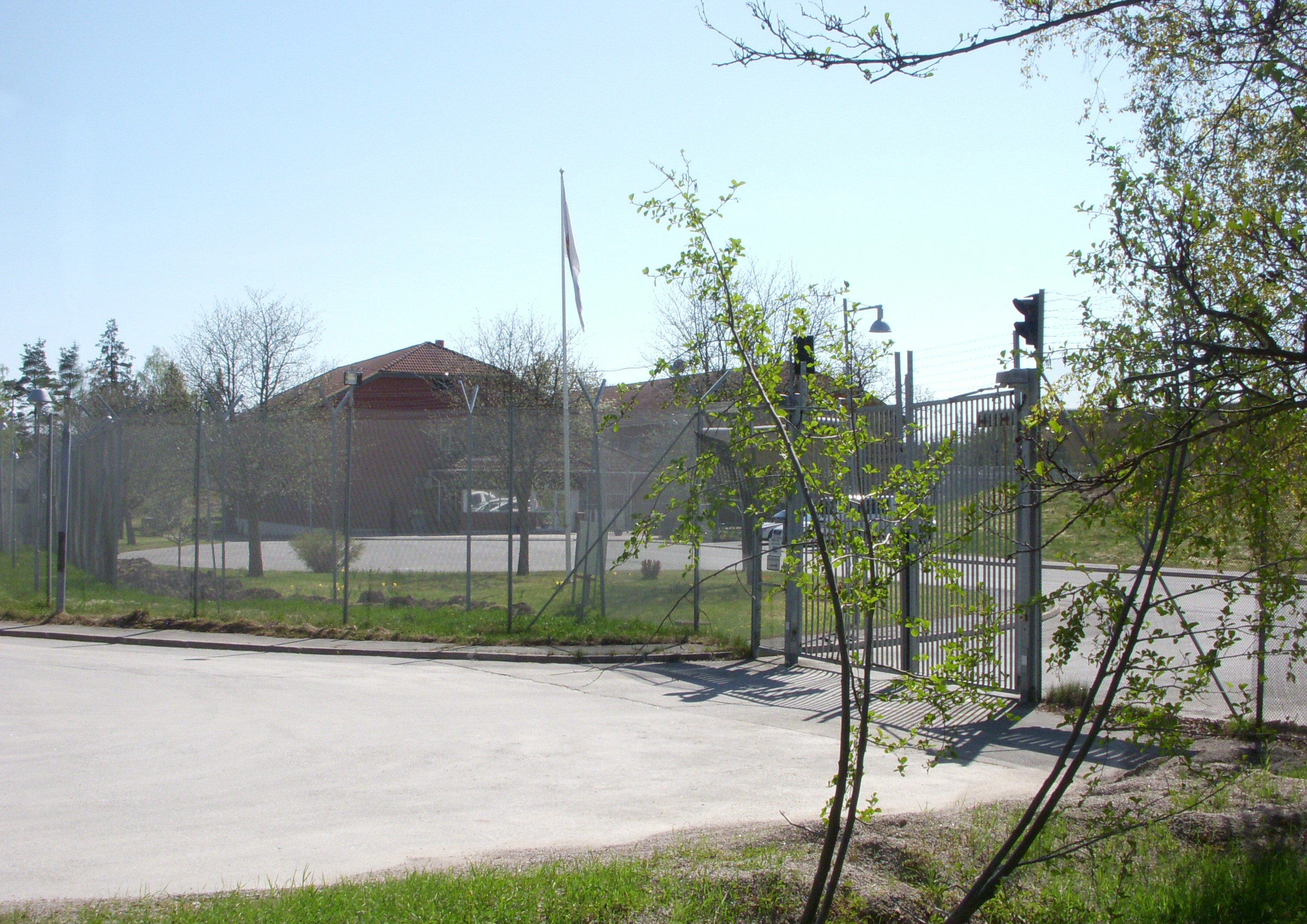 Beatebergsanläggningen i Skogås, Huddinge kommun